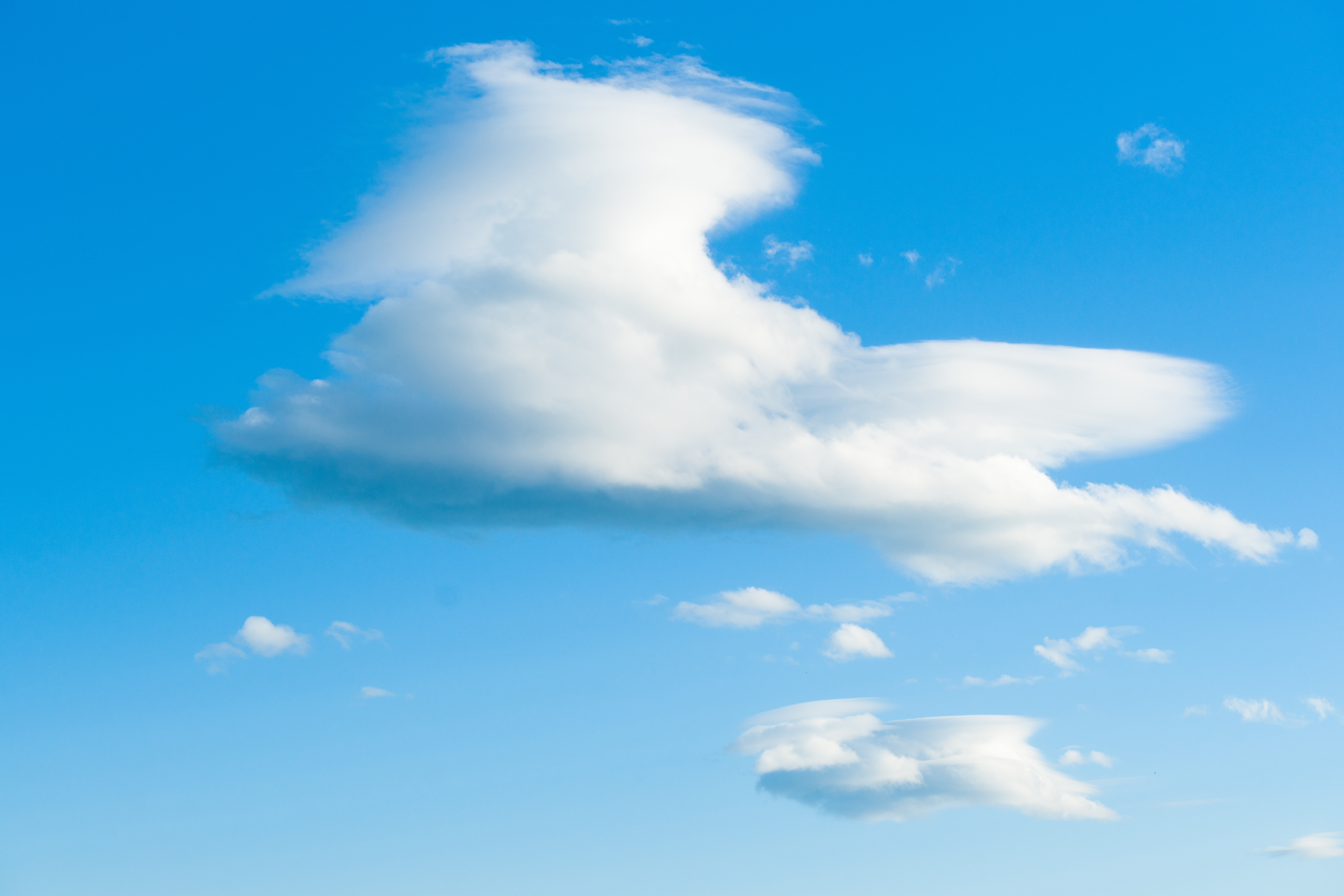 Altocumulus Lenticularis, au bord du lac de Neuchâtel à Hauterive.